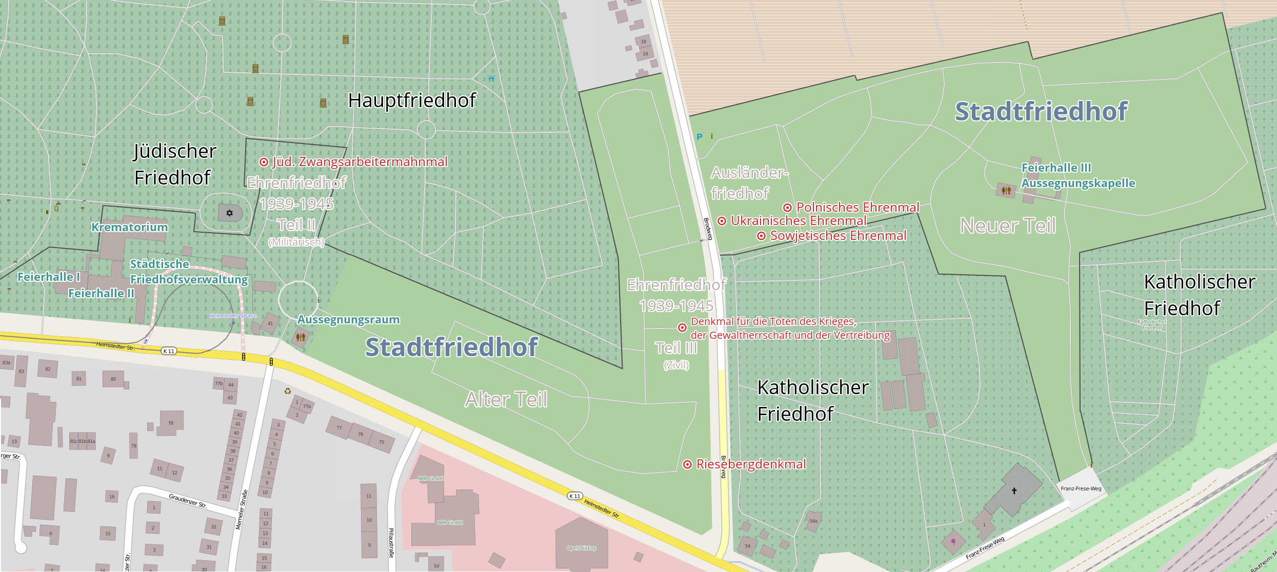 Plan des Stadtfriedhofes in Braunschweig 2014.